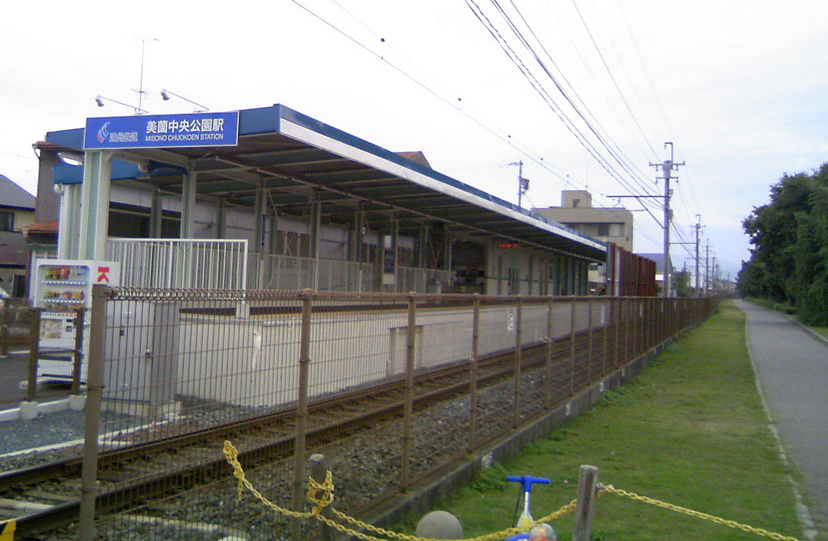 美薗中央公園駅